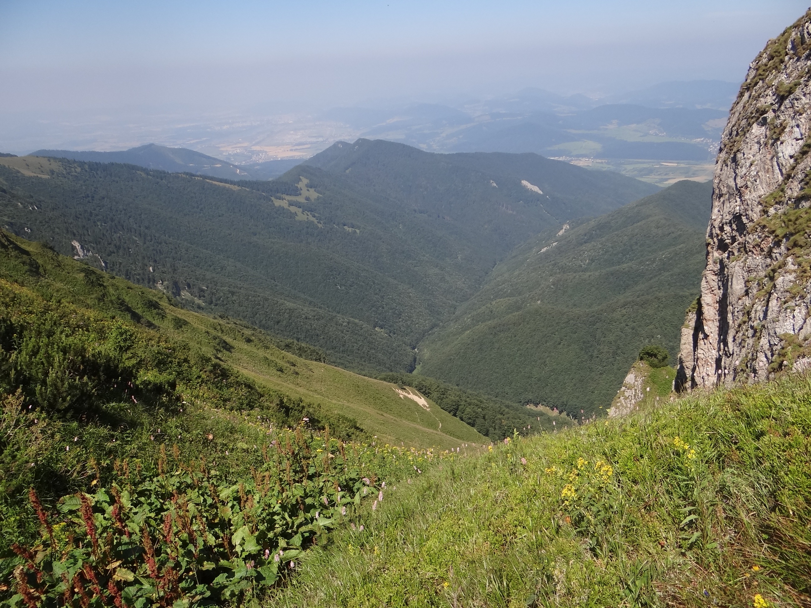 Belianská dolina